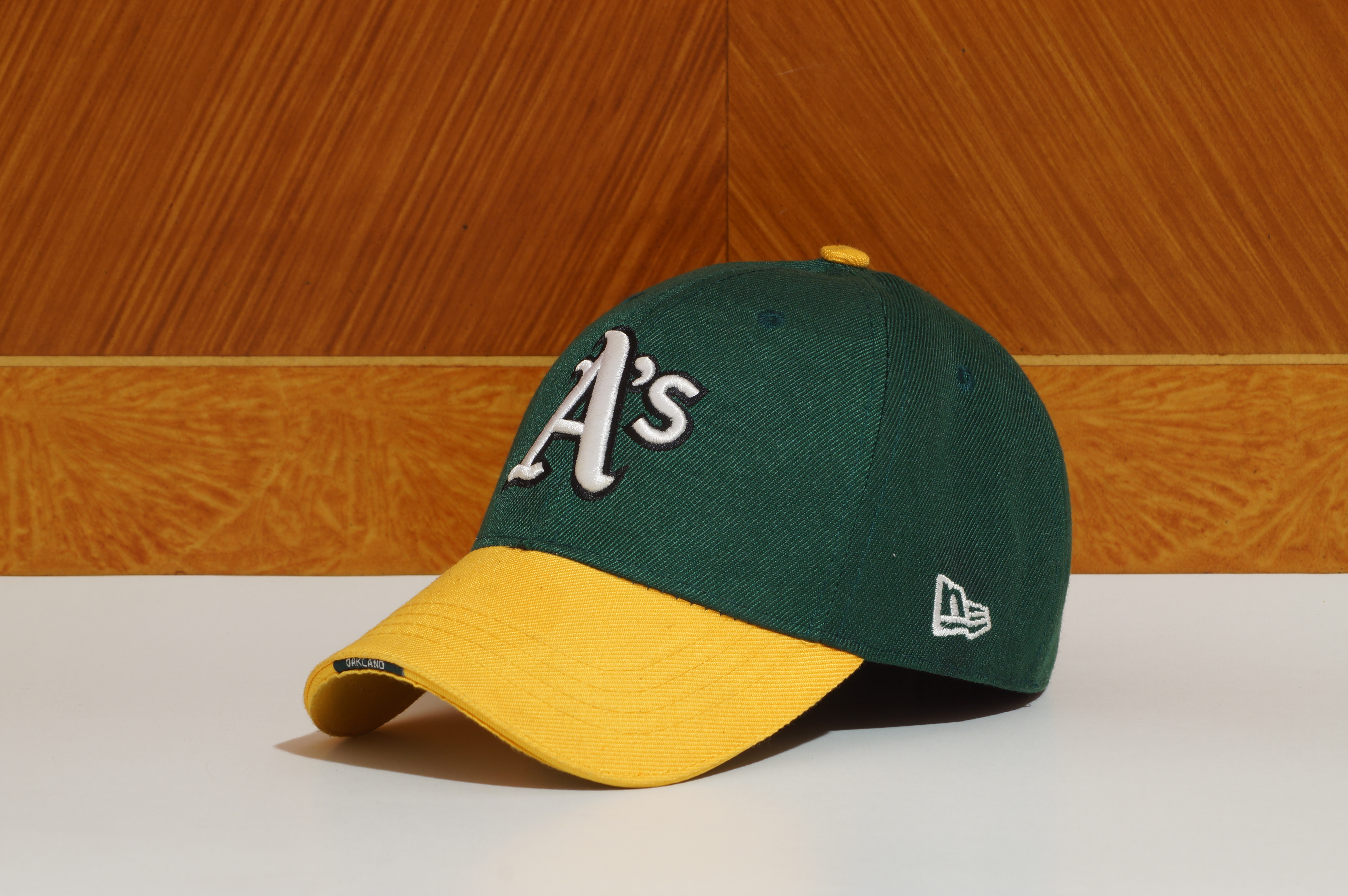 Gorra de Equipo de Grandes Liga